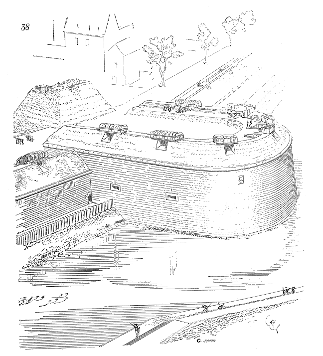 ... Quelques tentatives en ce genre furent cependant faites de ce côté-ci du Rhin, mais les tours françaises du commencement du XVIe siècle ont un plus grand diamètre, moins de hauteur et étaient couronnées par des batteries à barbette avec gabionnades, ou par des caponnières, comme celle présentée dans l'exemple précédent. Le plus souvent on fit de ces tours de véritables porte-flancs, c'est-à-dire qu'on leur donna, en plan horizontal, la forme d'un fer à cheval, et leurs batteries supérieures ne dépassèrent guère le niveau de la crête des courtines (fig. 38) ...